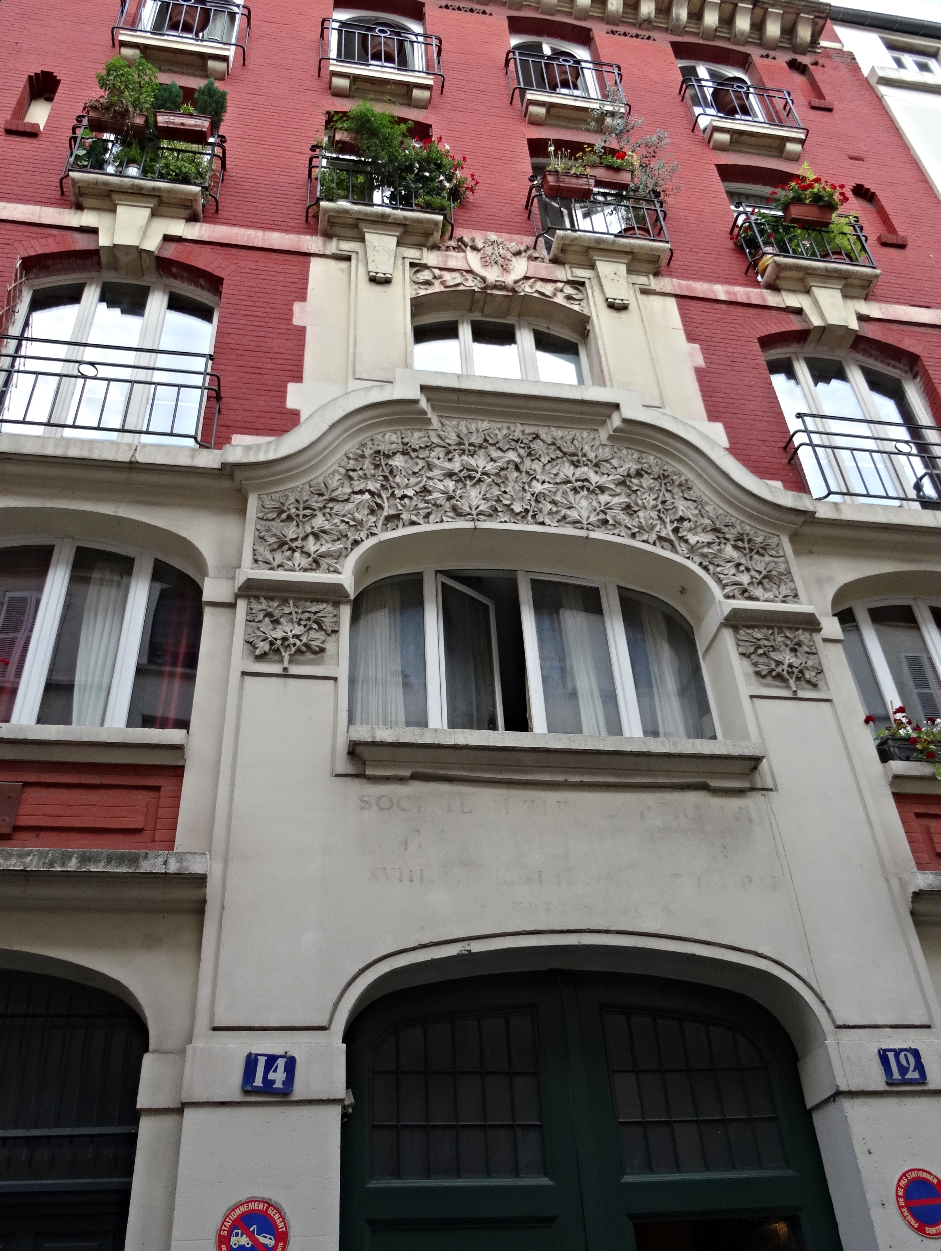 Immeuble ancienne coopérative ouvrière - 12 14 rue Jean Robert, Paris 18e : Immeuble mixte à usage de coopérative ouvrière et de logements construit en 1885 par l'architecte A. Vaillant pour le compte de "la société civile de consommation du XVIIIe arrondissement" (nom dont la trace gravée - puis effacée - est encore un peu visible sur la photo). Cela témoigne d'une rare incursion d’une coopérative ouvrière dans le domaine immobilier. Les coopératives ouvrières, issues des associations ouvrières après 1848, avaient pour principale fonction d'assurer la distribution alimentaire pour leurs adhérents. Ici, le rez-de-chaussée était destiné à un magasin coopératif. Les logements, destinés à rentabiliser l'opération, avaient été aménagés sur six niveaux pour être loués à des sociétaires qui avaient pu en déterminer les caractéristiques. Ces logements avaient été aménagés avec antichambre, moulures, parquets de chêne, cheminée, papier-peint... Ce désir de décorum, très critiqué par le mouvement philanthropique, se retrouve en façade, qui au-dessus du traditionnel soubassement en pierre, a été traitée en brique de Vaugirard. Sur cour, cette brique ordinaire est restée apparente, tandis que sur rue, le "parement vu" a été réalisé en brique de Bourgogne, avec une modénature de convention.